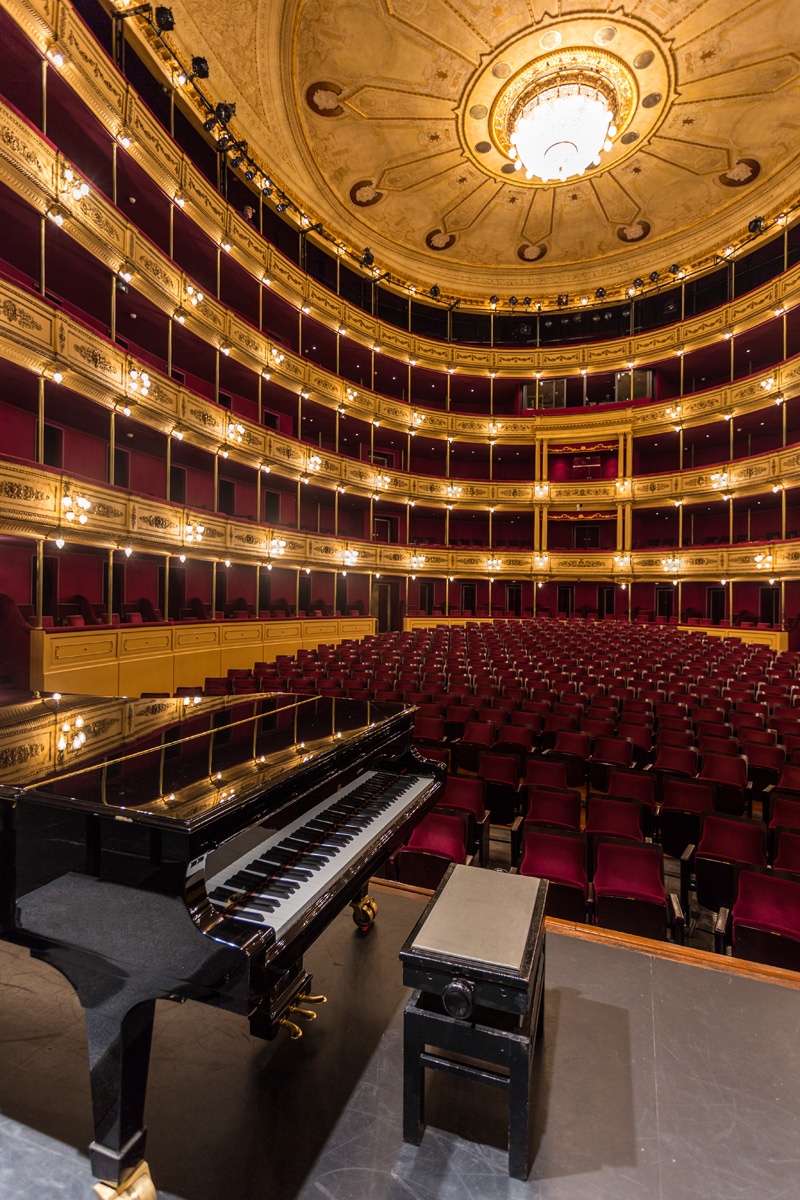 Teatro Solís. Ubicada en el departamento de Montevideo